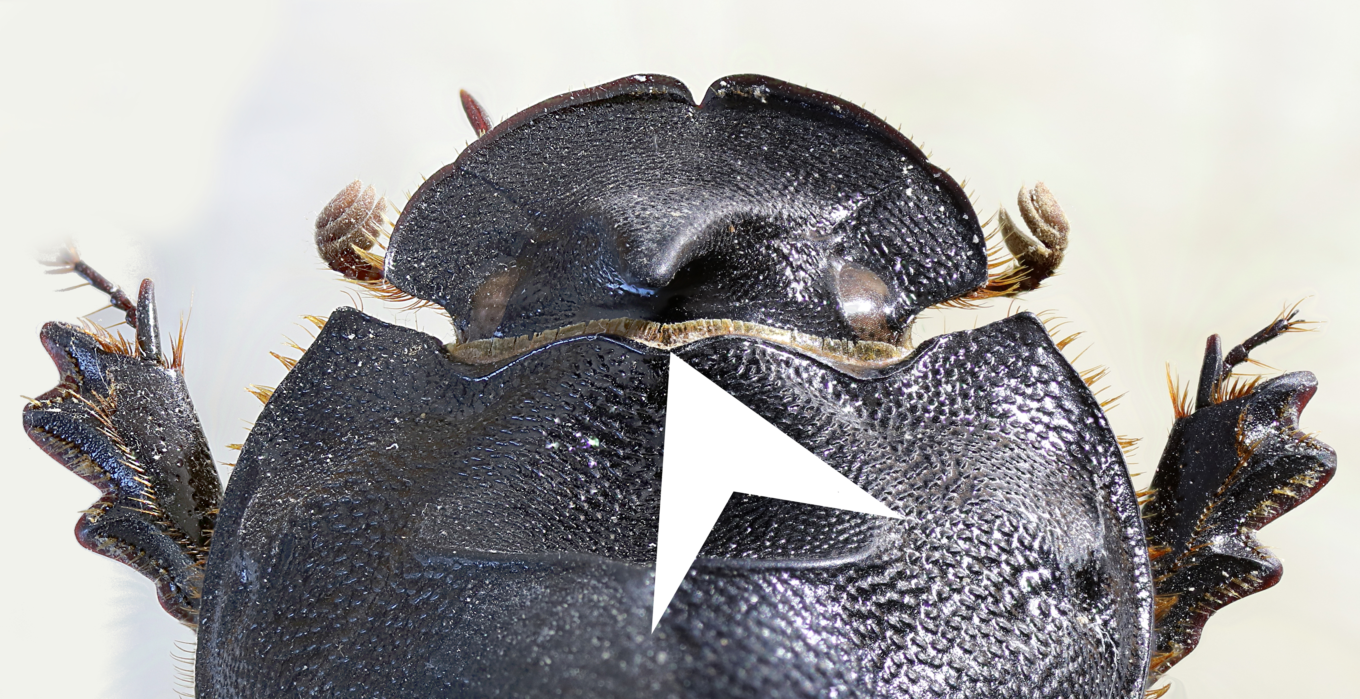 Copris hispanus, Vorderteil von oben; Pfeilspitze zur Aussparung am Vorderrand des Pronotums hinter dem Kopfhorn